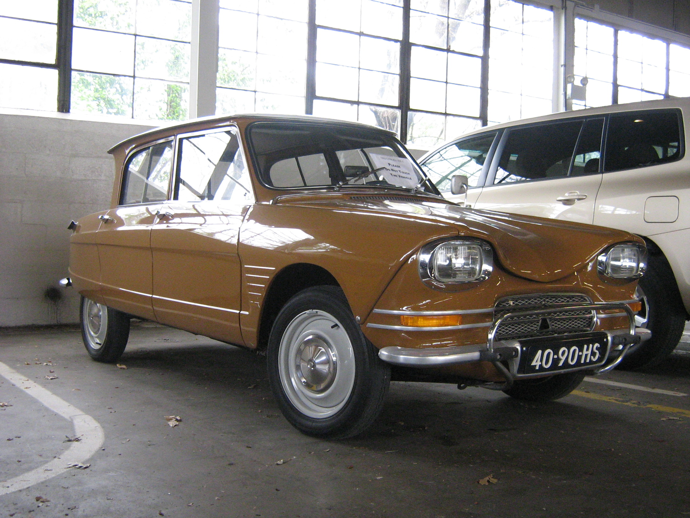 Citroen